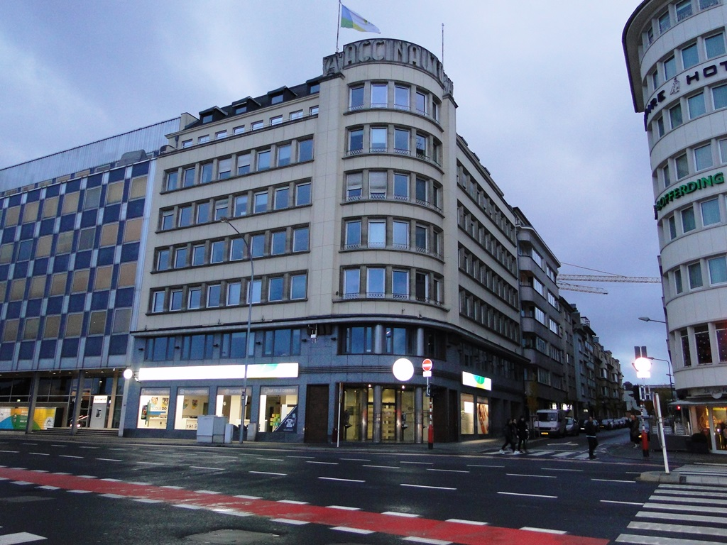 immeuble Accinauto (11.2014)